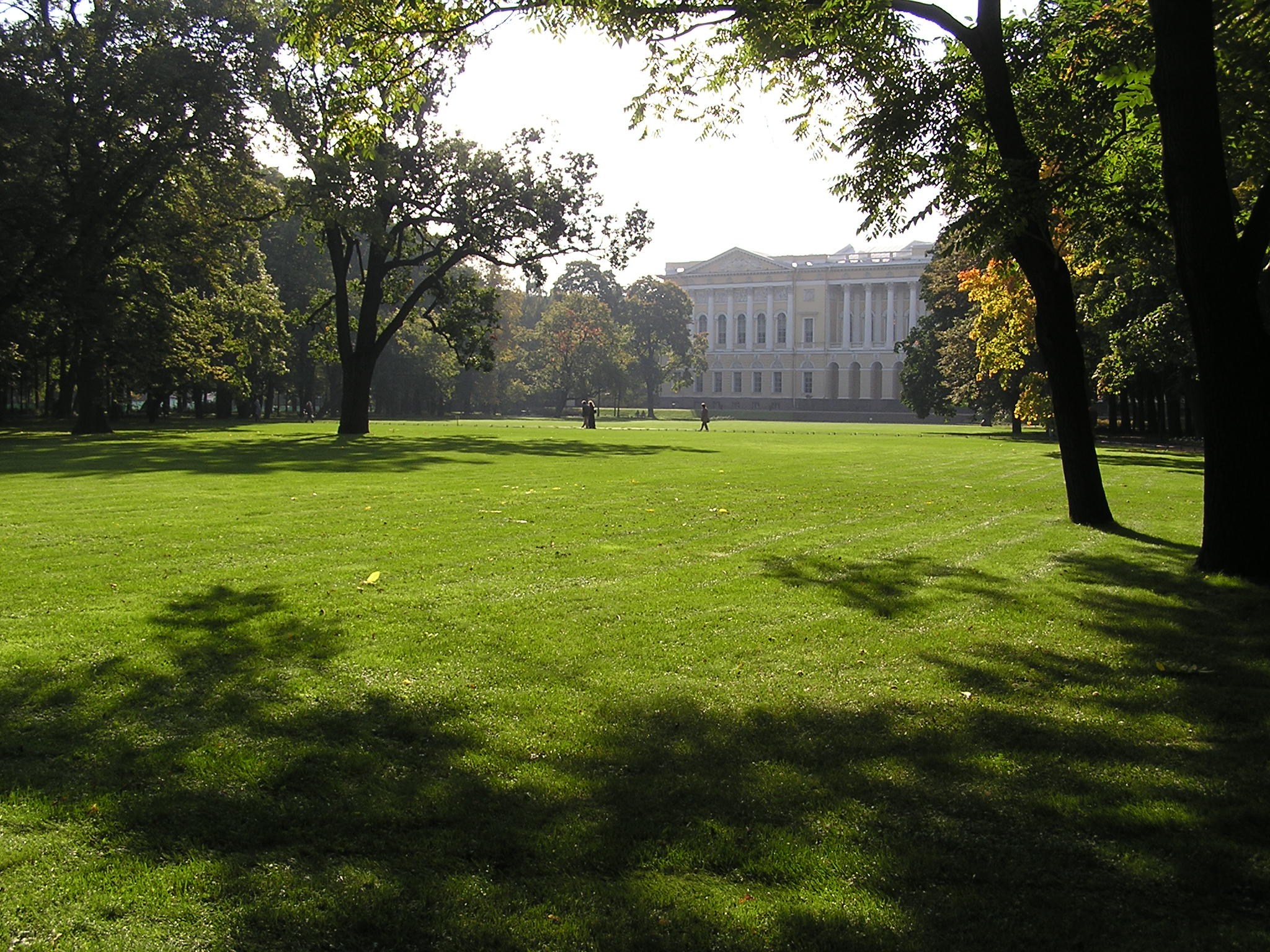 Санкт-Петербург. Михайловский сад